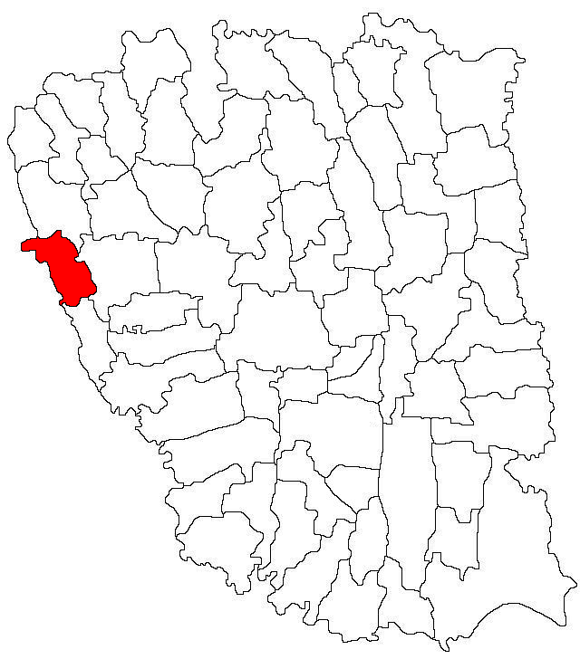 Categorie:Hărţi ale judeţului Galaţi